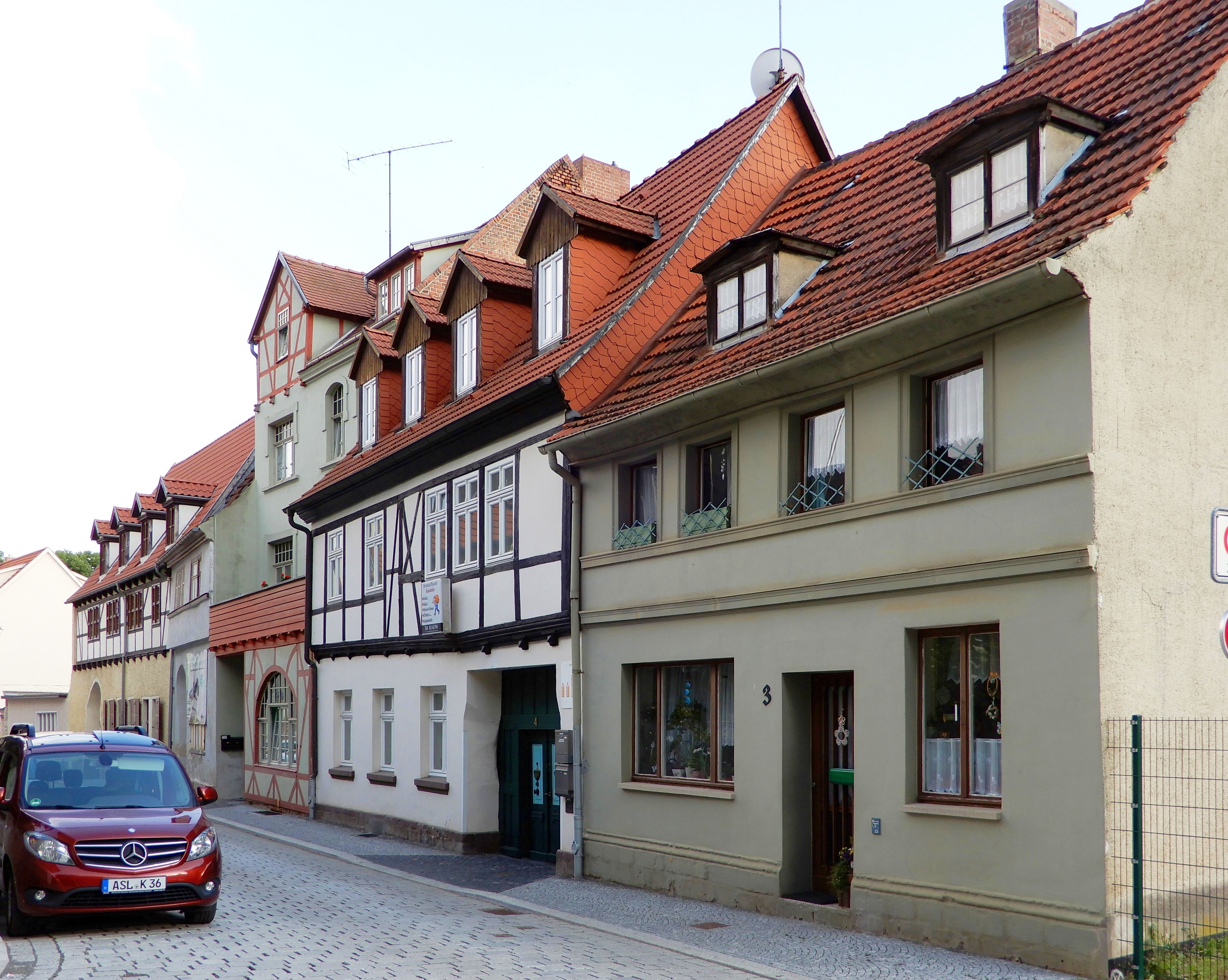 Gebäude Über dem Wasser 3-7 in Aschersleben